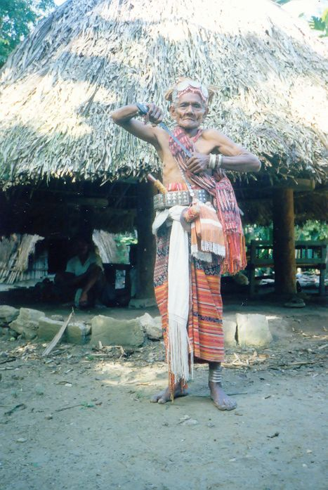 Traditionelles Kopfjäger-Ornat, Toi Anas, Nordamanatun